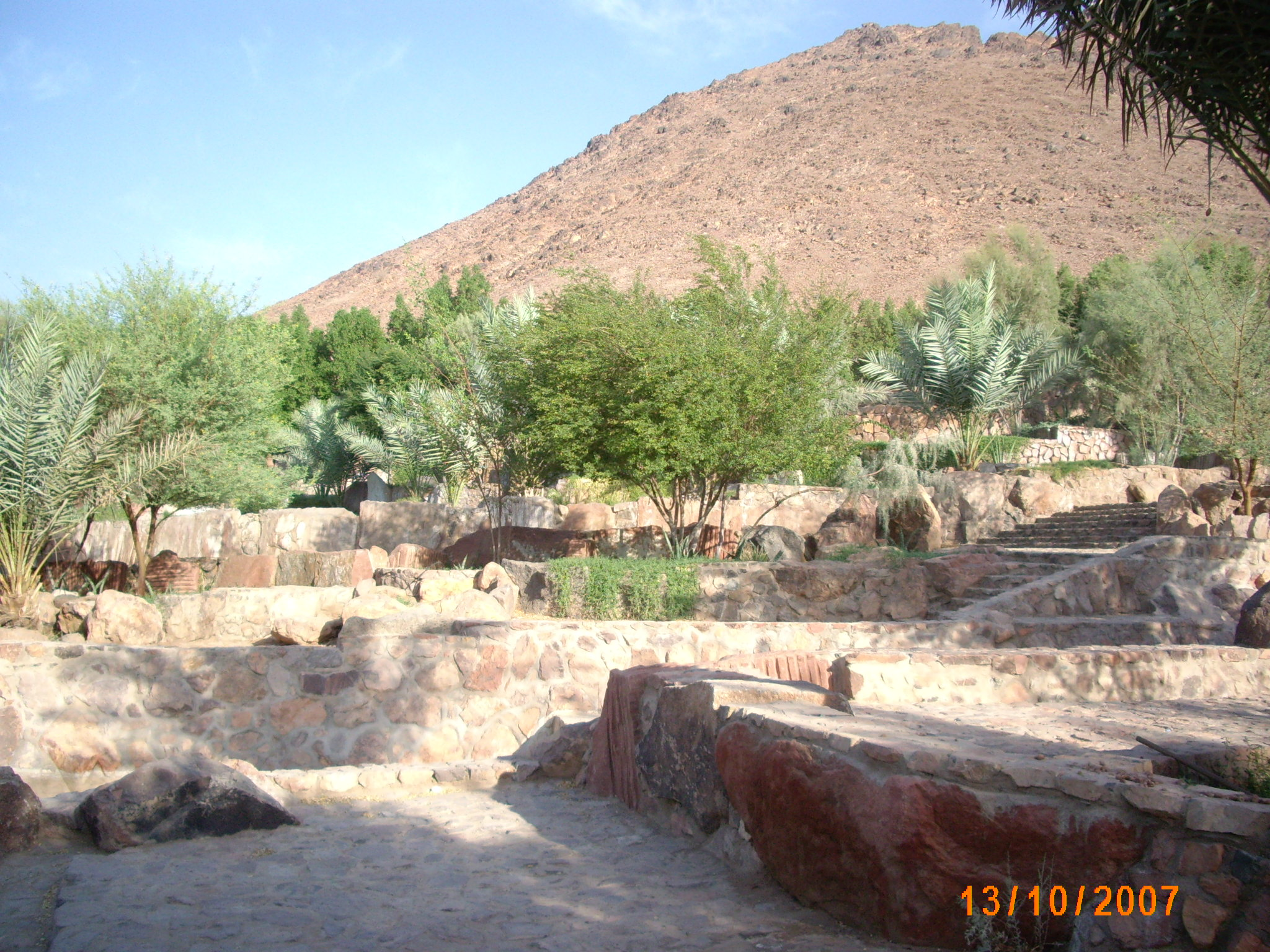 ഉഹദ് മല മദീന